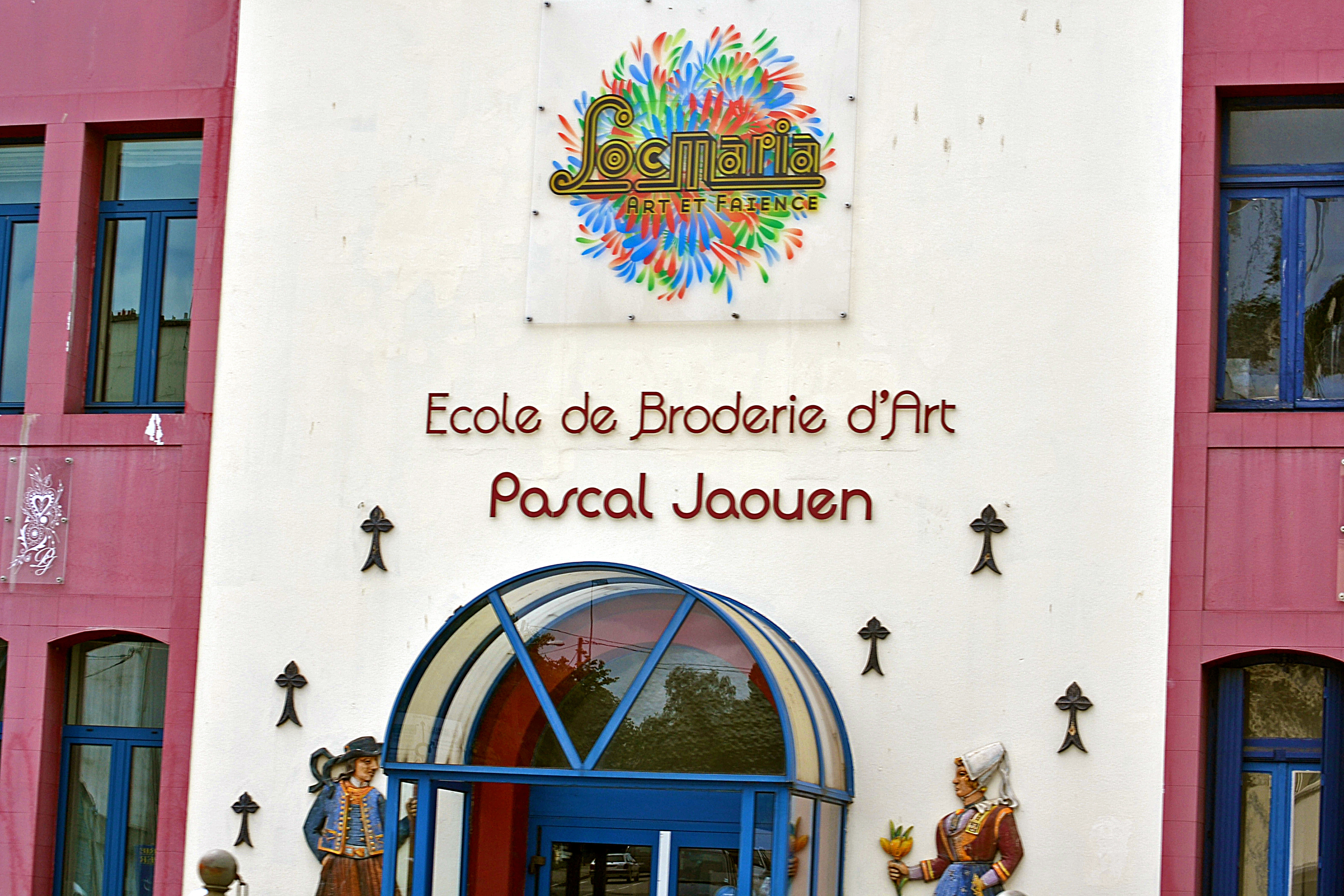 L'école de broderie d'art de Quimper a été créée par Pascal Jaouen afin de transmettre un savoir-faire et de maintenir une tradition bretonne.